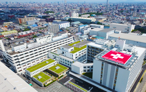 外観を上空から撮影したもの